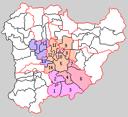 奈良県高市郡の町村制時点の町村。